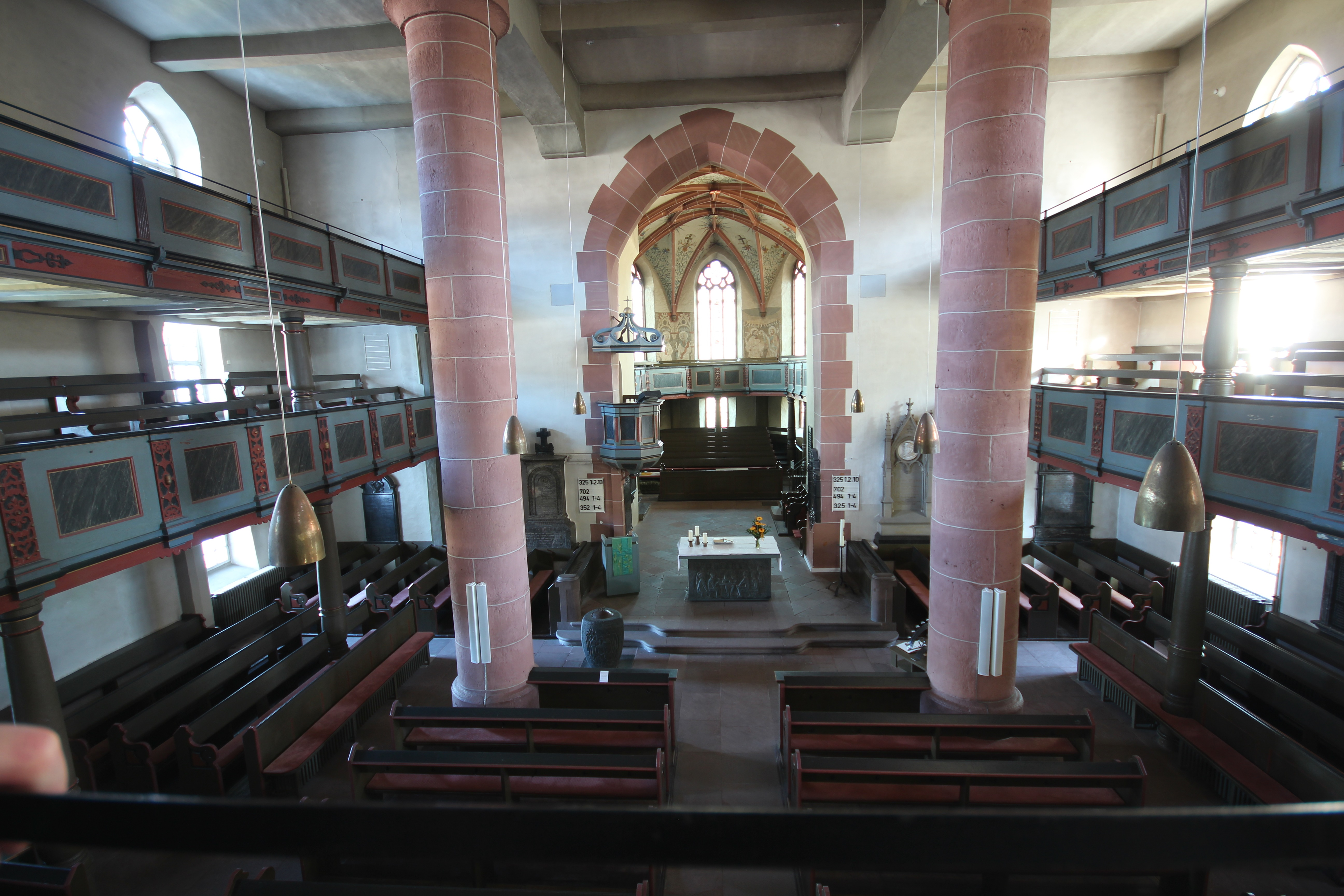 Kirchenschiff der Evangelischen Stadtkirche Herborn mit Emporen und Blick in den Chorraum